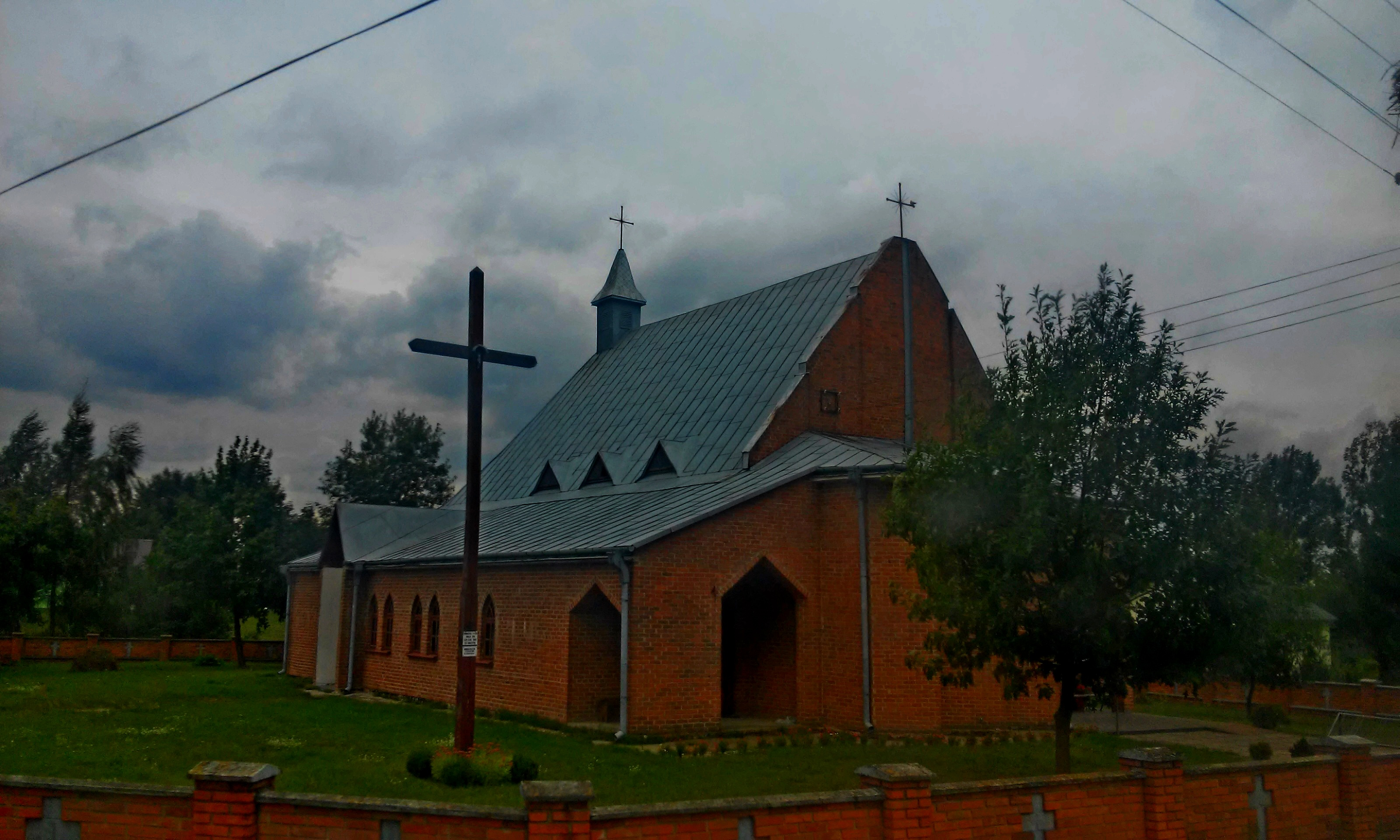 Kościół w Siedliszczu, gmina Dubienka